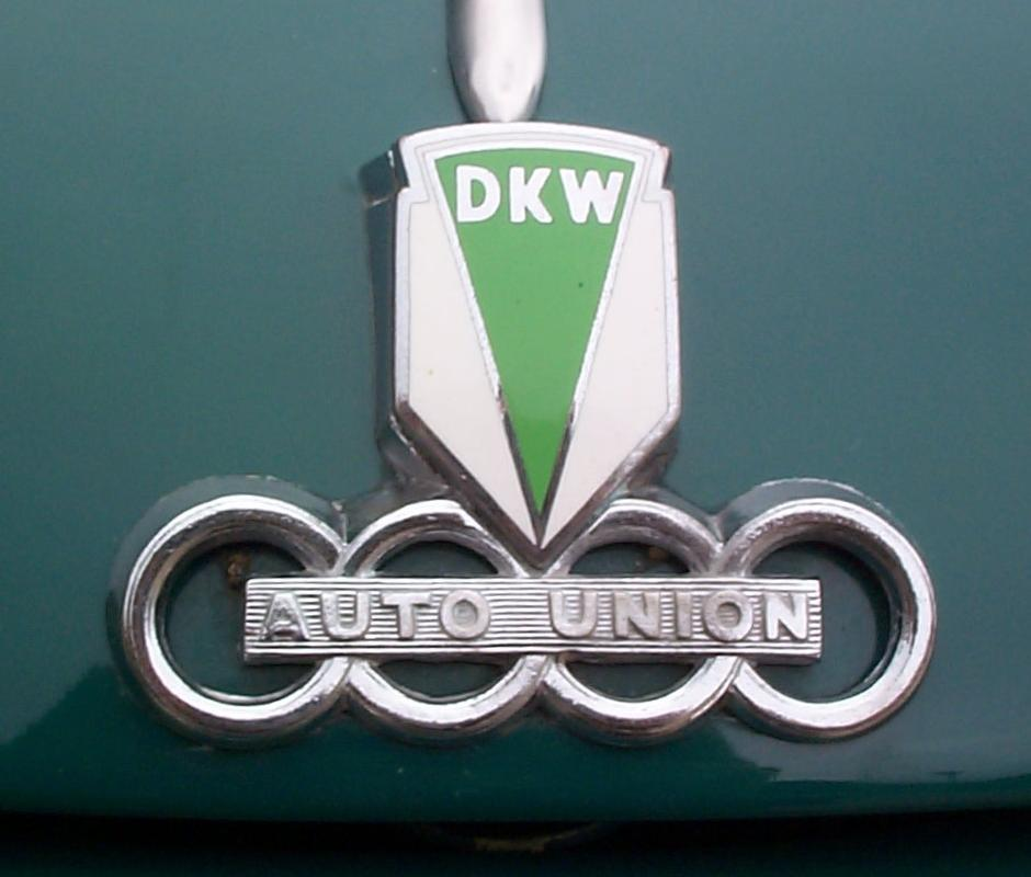 DKW Auto Union Logo auf Haube vorn